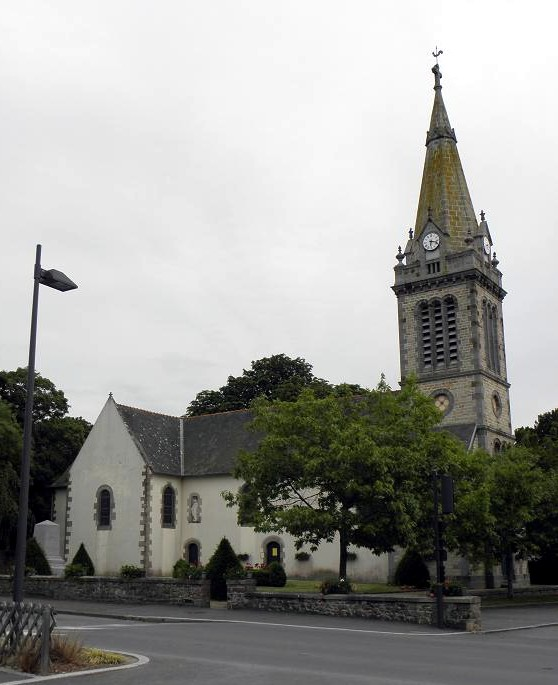 Flanc septentrional de l'église Notre-Dame de La Gouesnière (35).